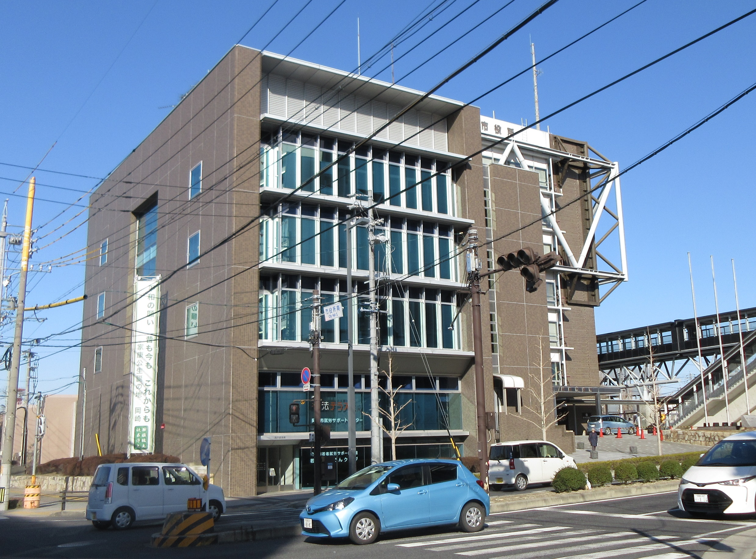 岡崎市役所、西庁舎南棟。